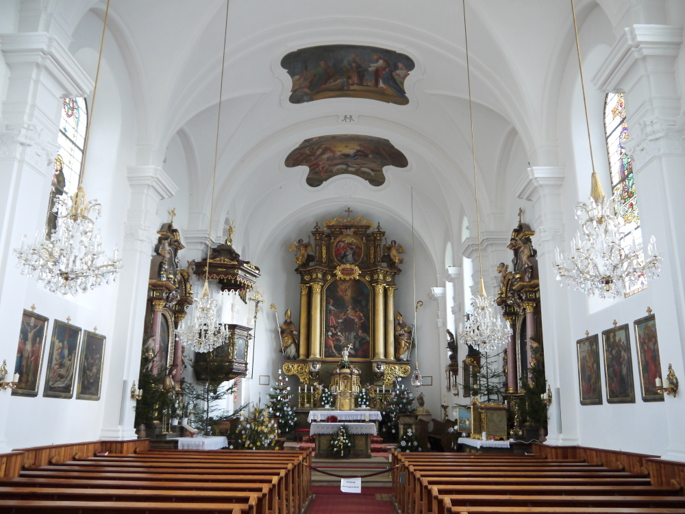 Kath. Pfarrkirche hl. Maximilian mit Friedhof